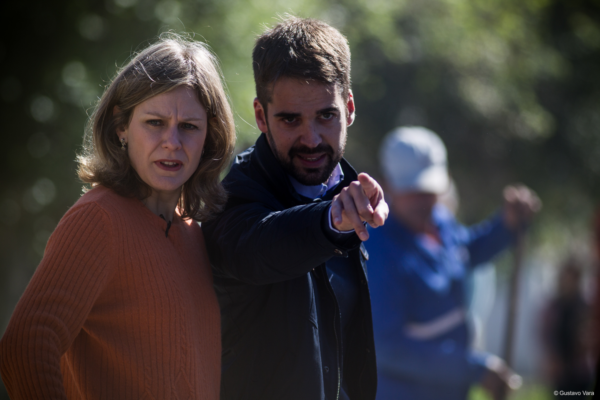 Eduardo Leite e Paula Mascarenhas em setembro de 2016.